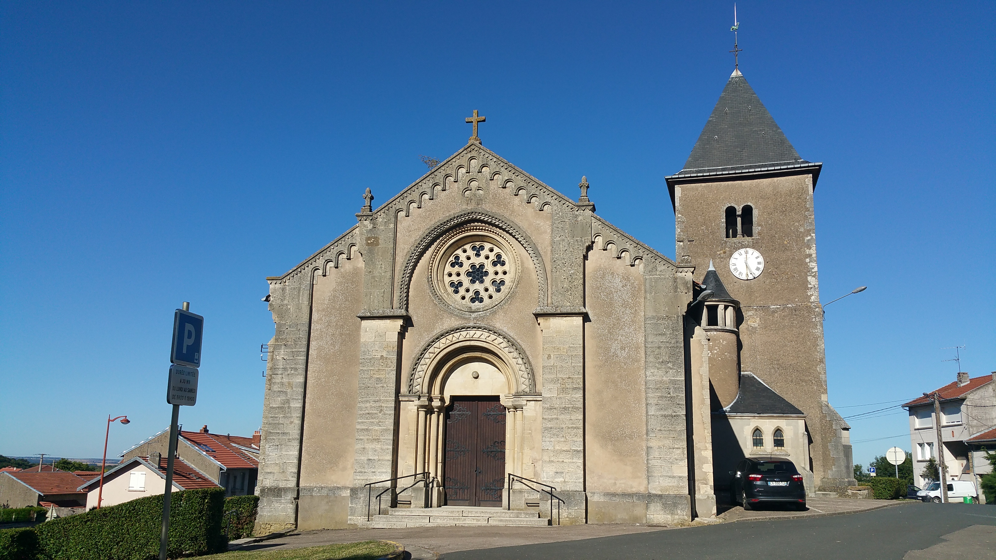 Eglise de Jeandelaincourt